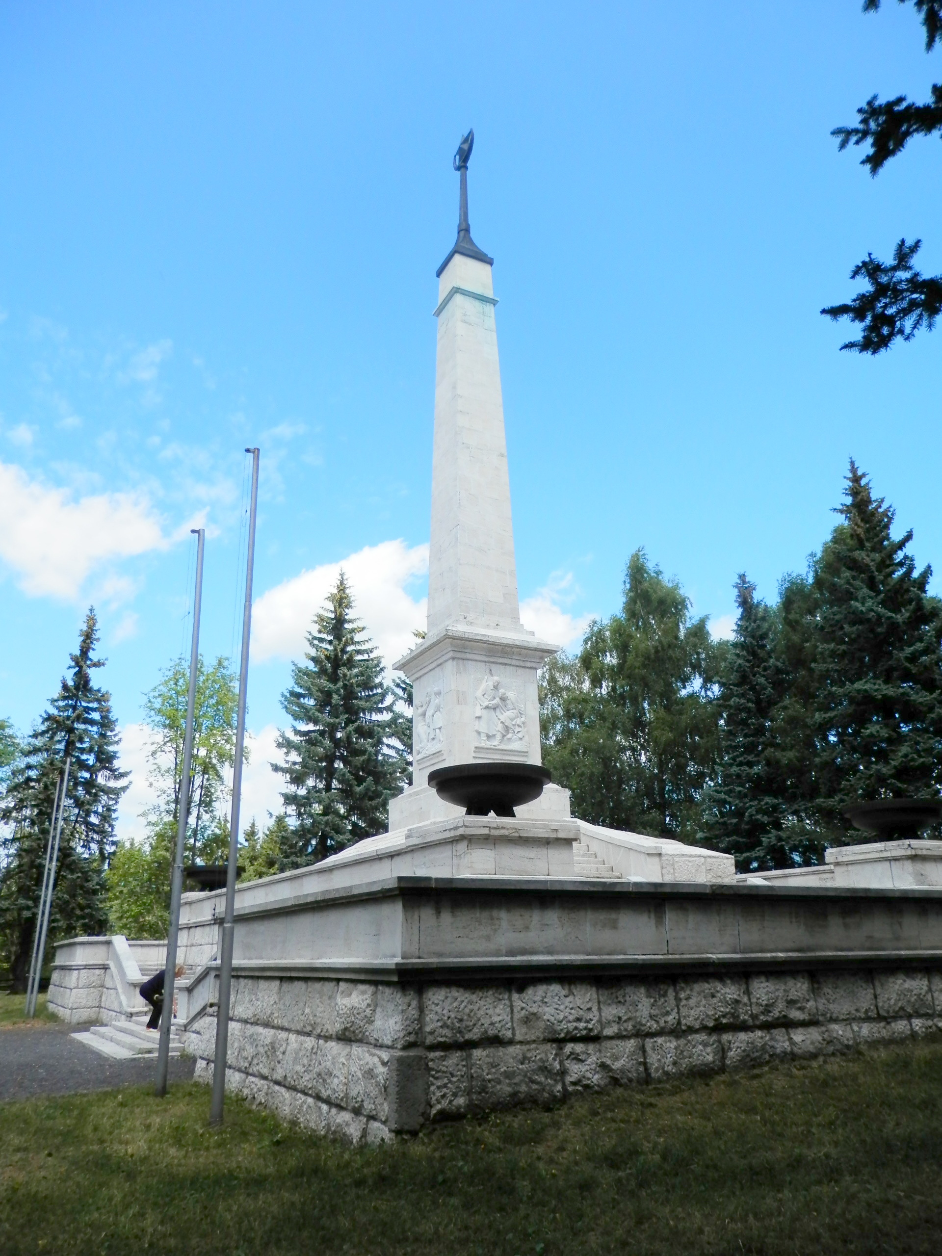 Celému Areálu piety dominuje 15 metrov vysoký pylón zo spišského travertínu. K terénu je upevnený štyrmi nárožnými soklami s tepanými vázami pre grécky oheň. Pylón na svojom špici drží päťcípu hviezdu. Autormi sú architekti Aladár Búzik a Ladislav Bauer.